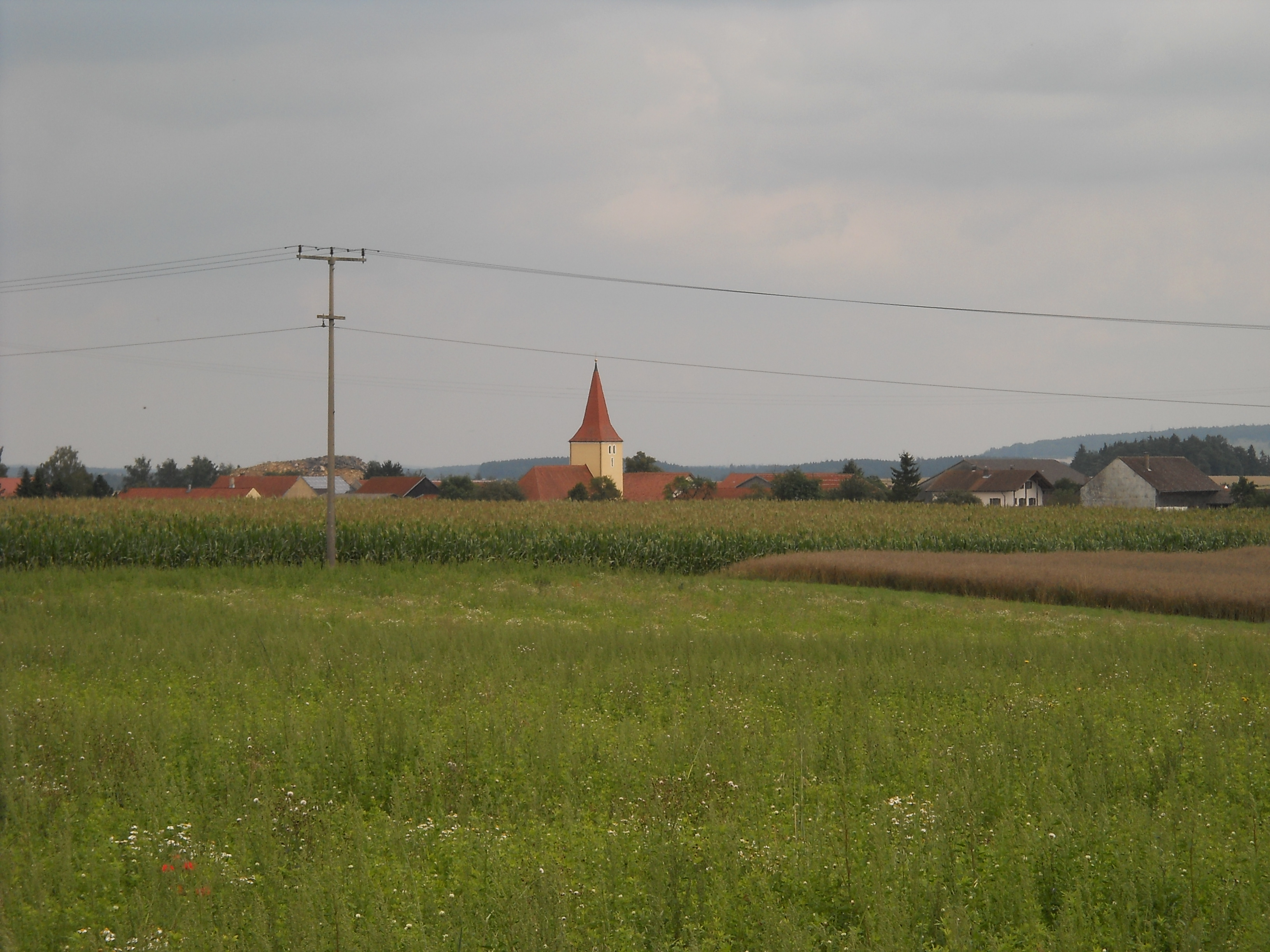 Erkertshofen im Landkreis Eichstätt/Bayern